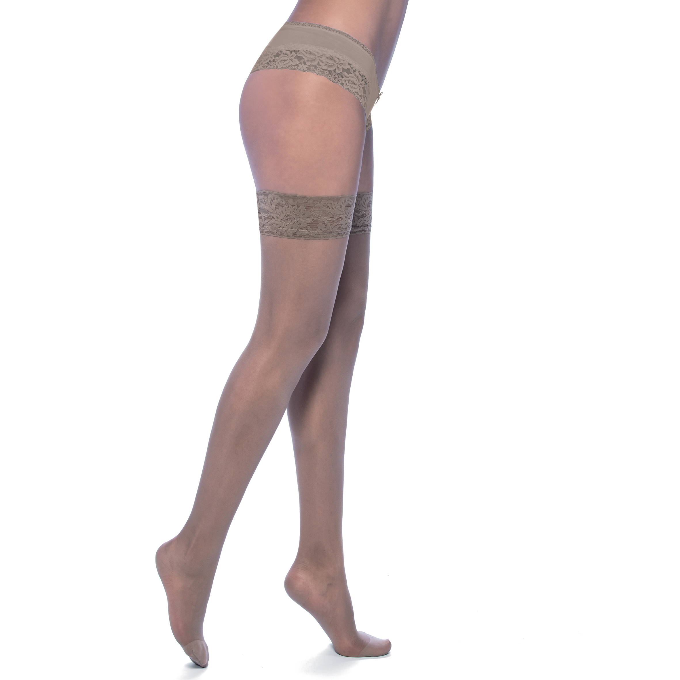 Prodotto italiano realizzato con filati di qualità